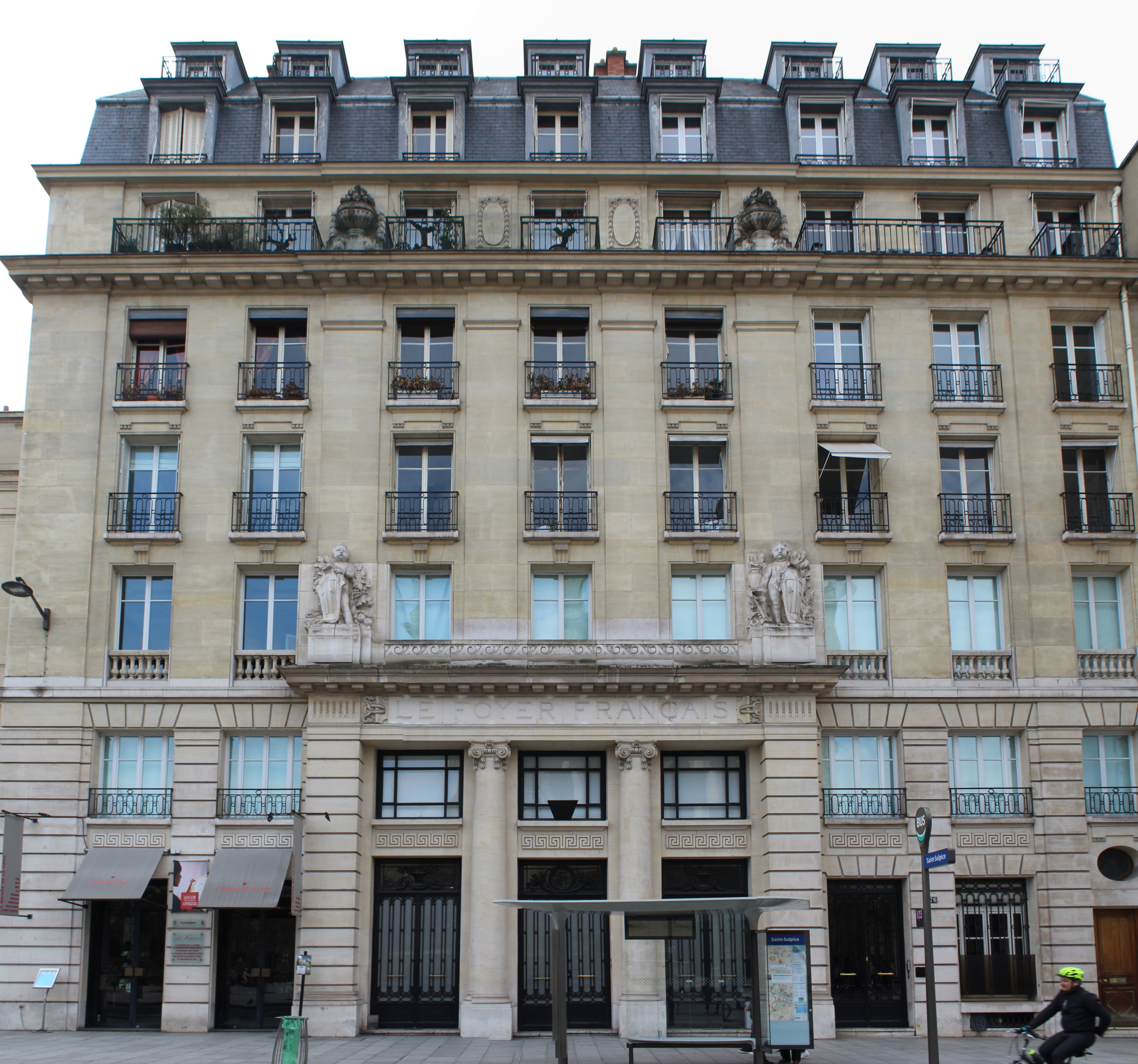 Immeuble, 76 rue Bonaparte, Paris.